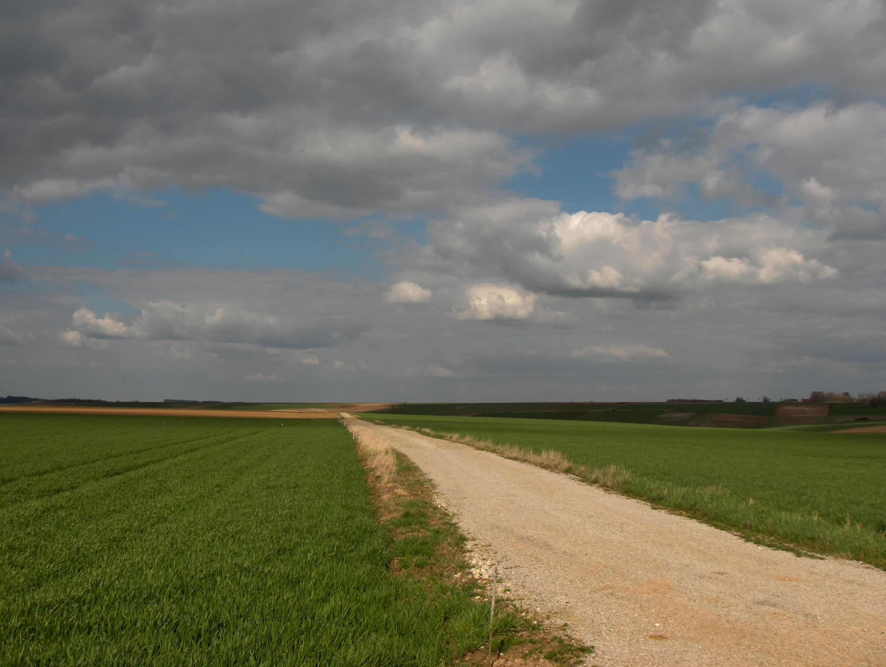 Landschaft im Artois (Frankreich, Dept. Pas-de-Calais), in der Nähe von Delettes.